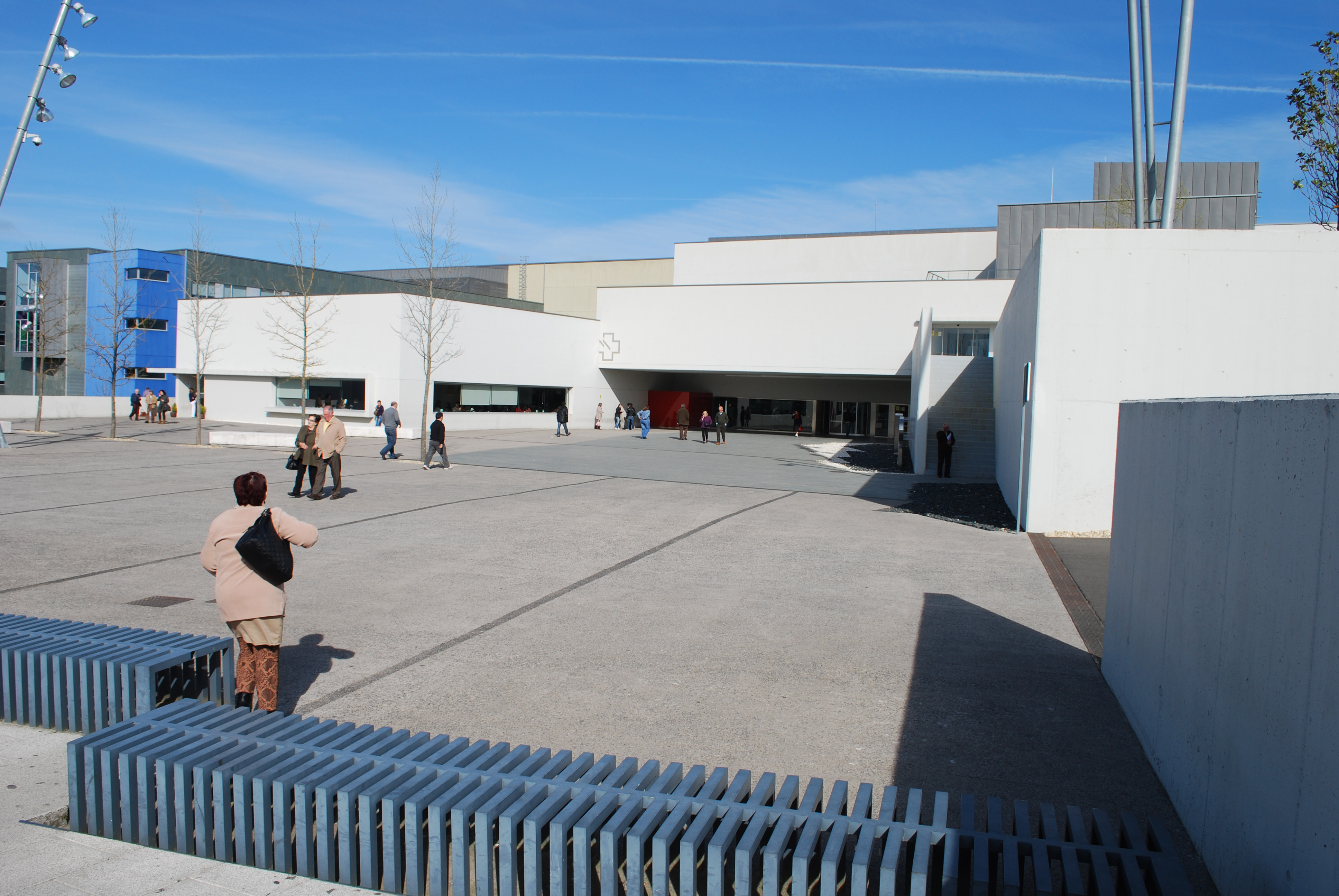 HULA Hospital lucus Augusti Lugo Galiza Spain